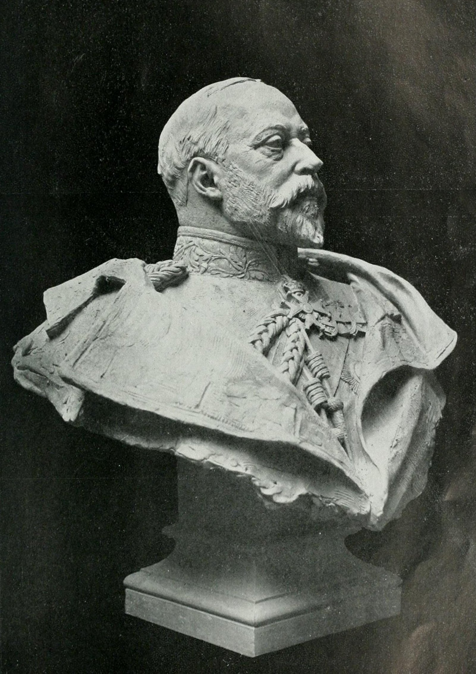 Buste d'Édouard VII